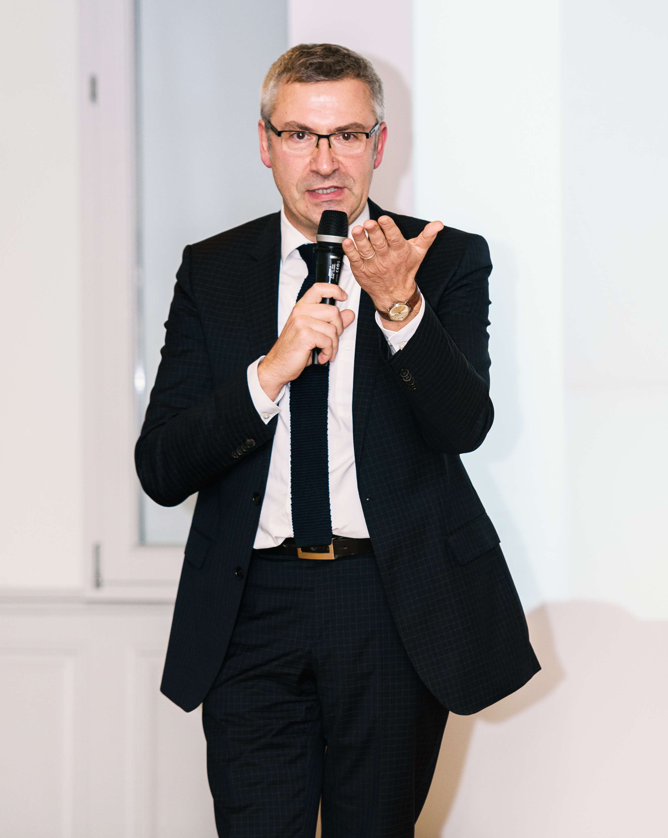 Ernst Seidl während des Festsymposions "10 Jahre MUT UNIVERSITÄT ALS/UND/VERSUS MUSEUM?", 2016 in Tübingen